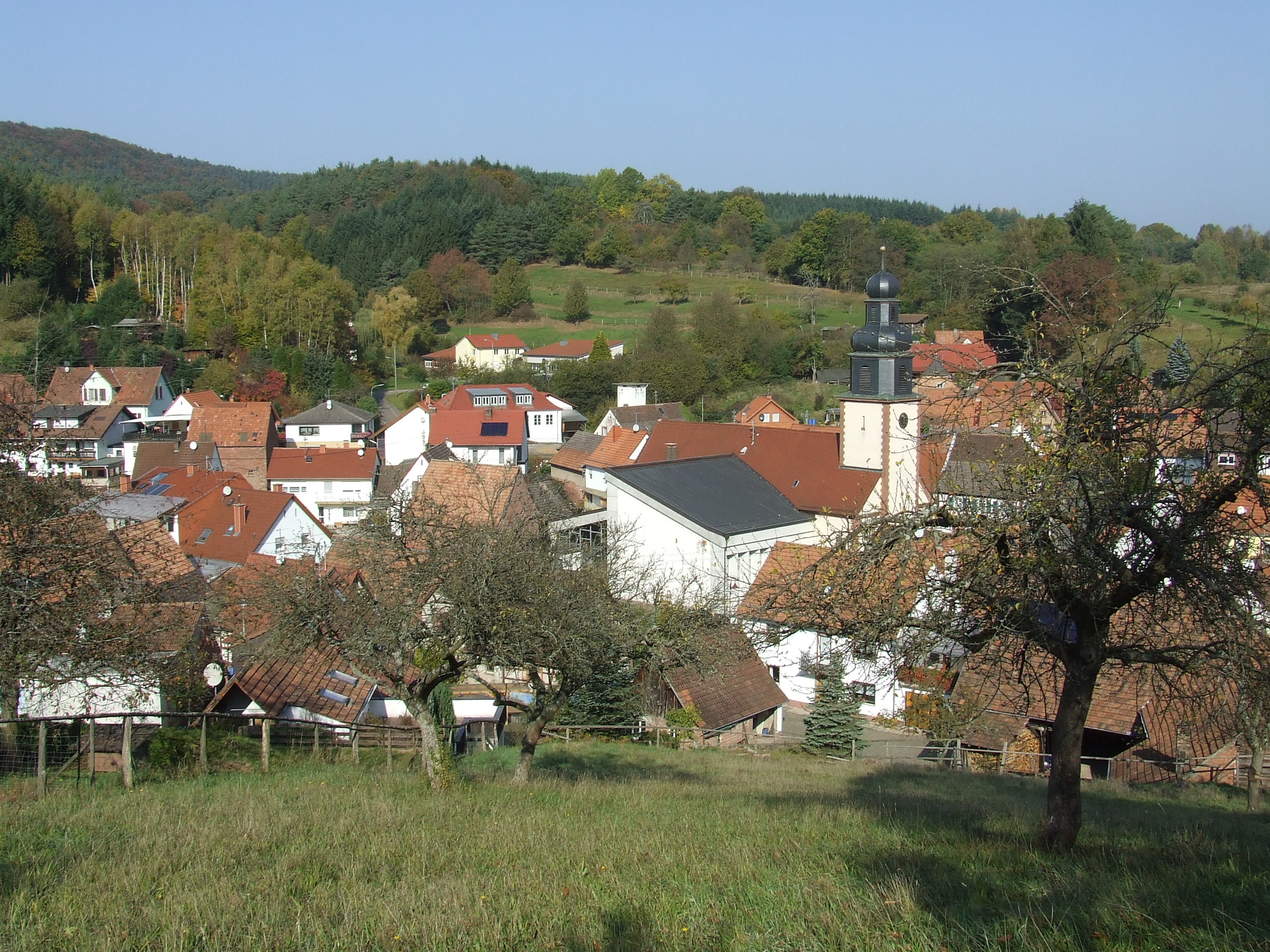 Schwanheim - Ortsmitte